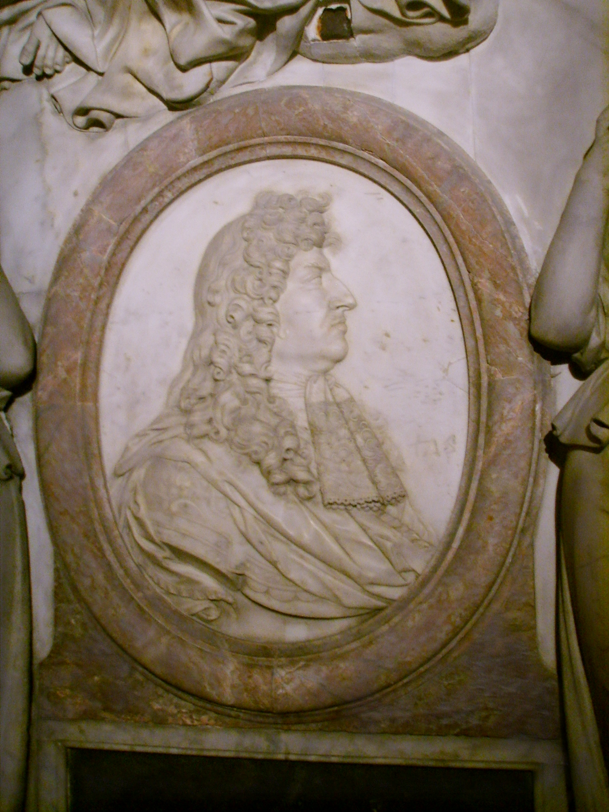 Basilica di Saint Denis, Parigi, Luigi XIV.